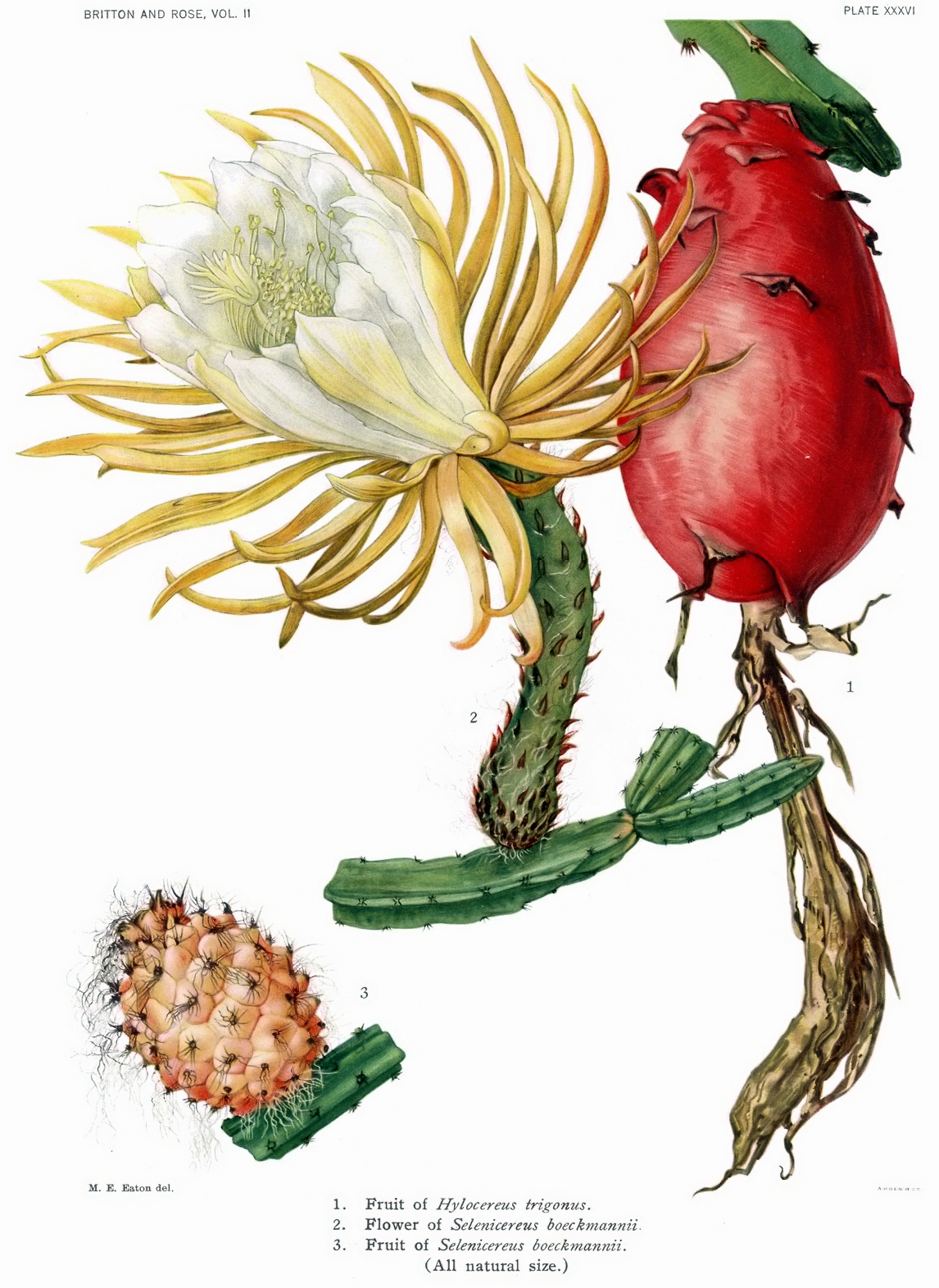 Hylocereus triangularis